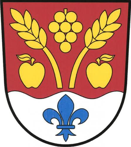 Znak, Lhotka nad Labem, okres Litoměřice